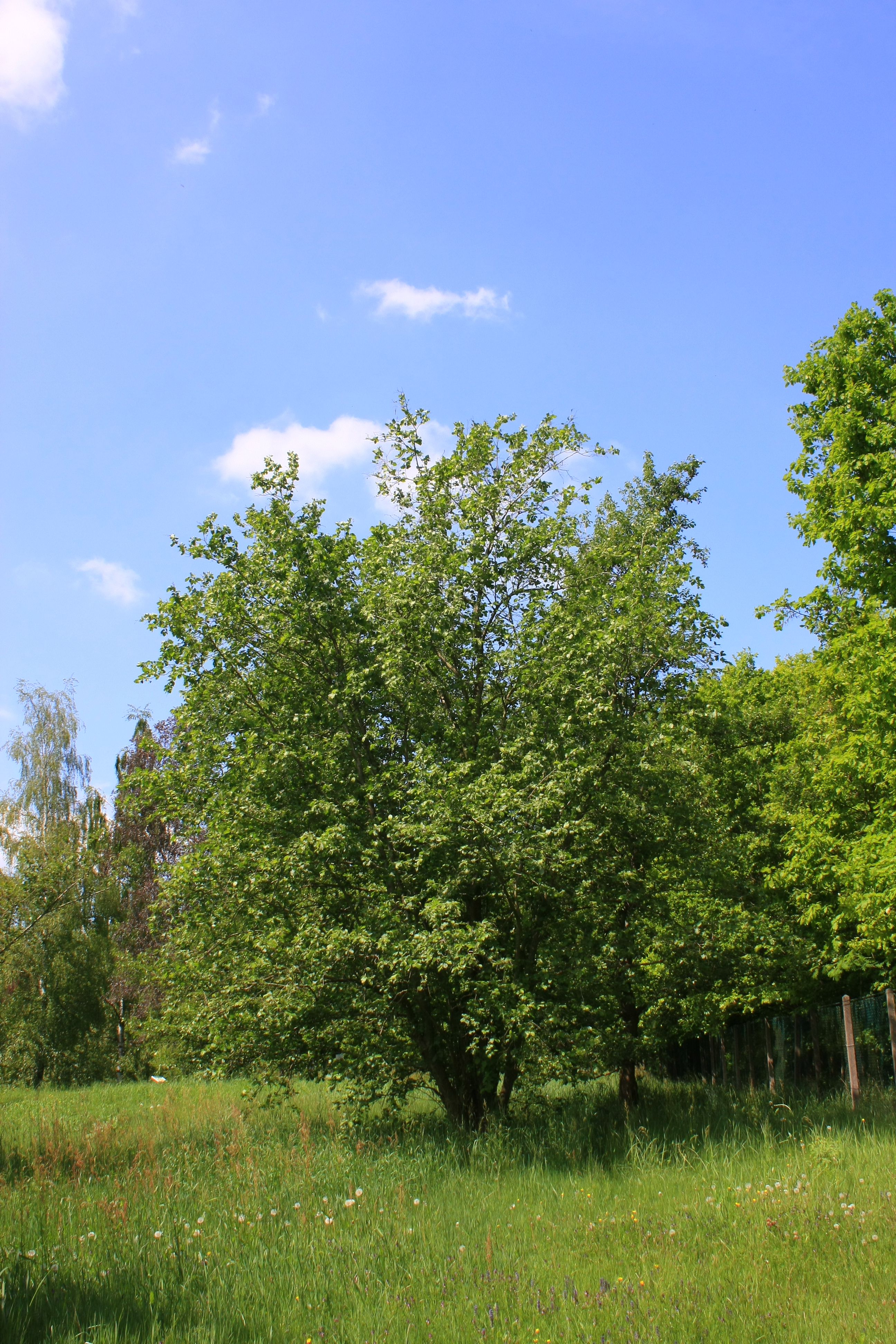 Grauerle (Alnus incana) im Neuen Botanischen Garten Marburg, Hessen, Deutschland